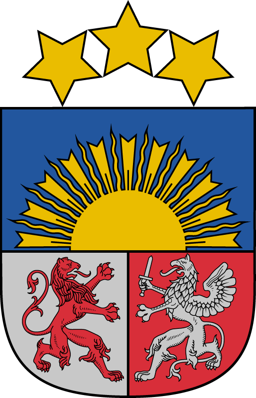 Беларуская (тарашкевіца): Малы герб Латвійскай рэспублікі.